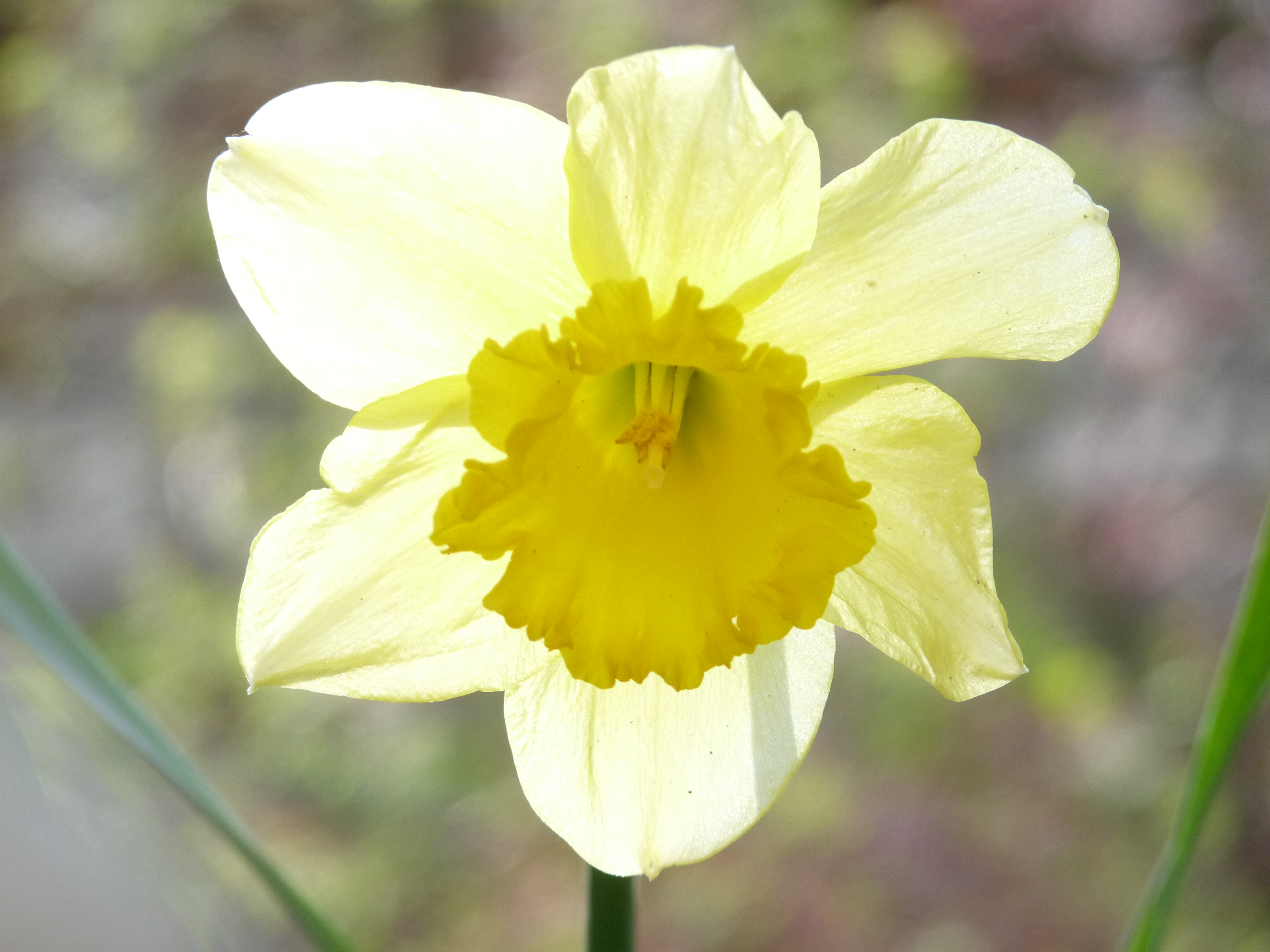 Gros plan sur une fleur de Jonquille